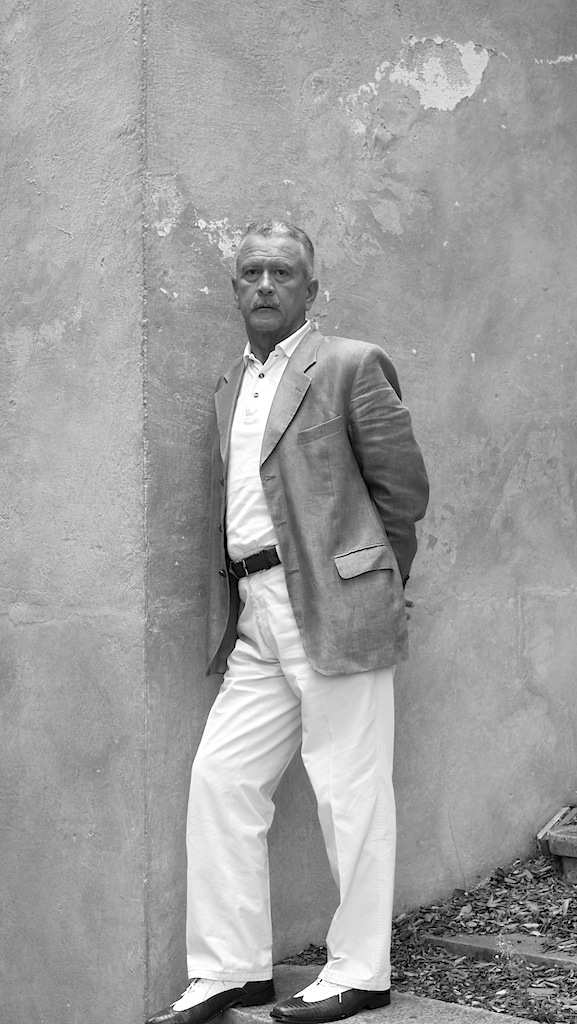 poeta José Carlos Cataño